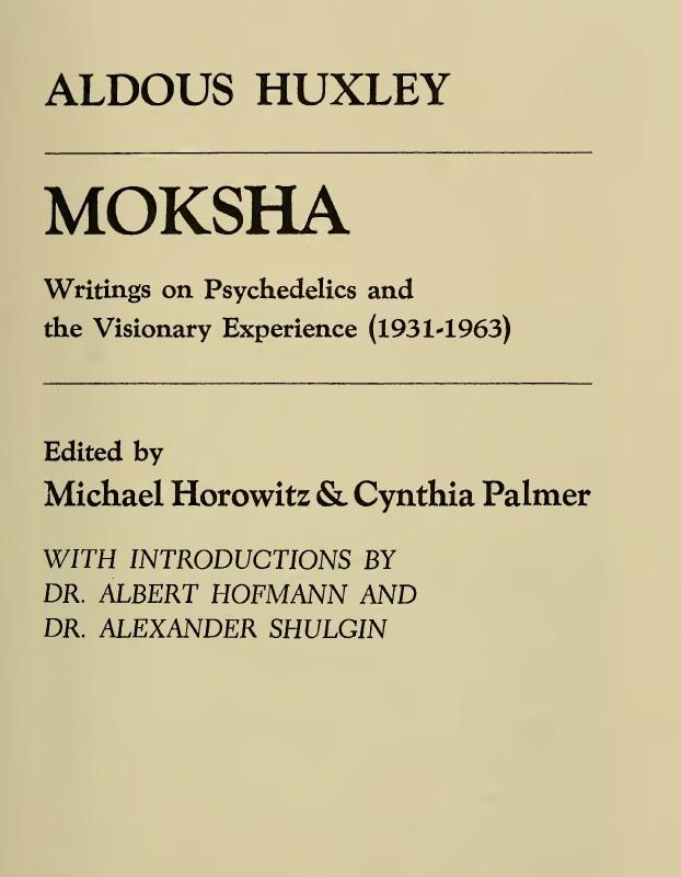 Moksha: Writings on Psychedelics and the Visionary Experience (1931-1963) / Aldous Huxley; edited by Michael Horowitz & Cynthia Palmer; with introductions by Dr. Albert Hofmann and Dr. Alexander Shulgin. New York: Stonehill, 1977. xxii, 314 p.; 24 cm. Frontespizio